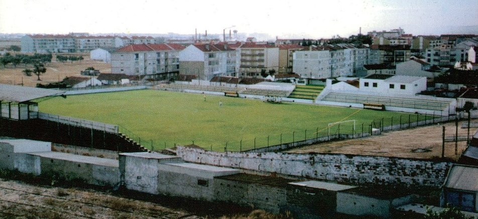 Campo Luis Almeida Fidalgo, Montijo